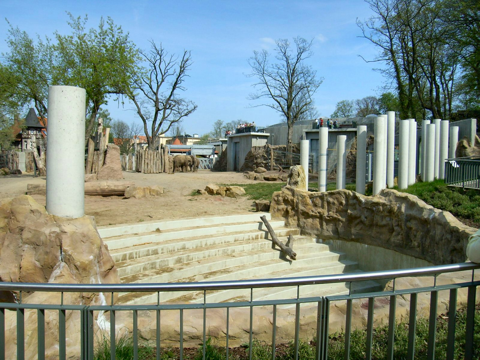 Zoologischer Garten Halle (Saale),Elefantenhaus